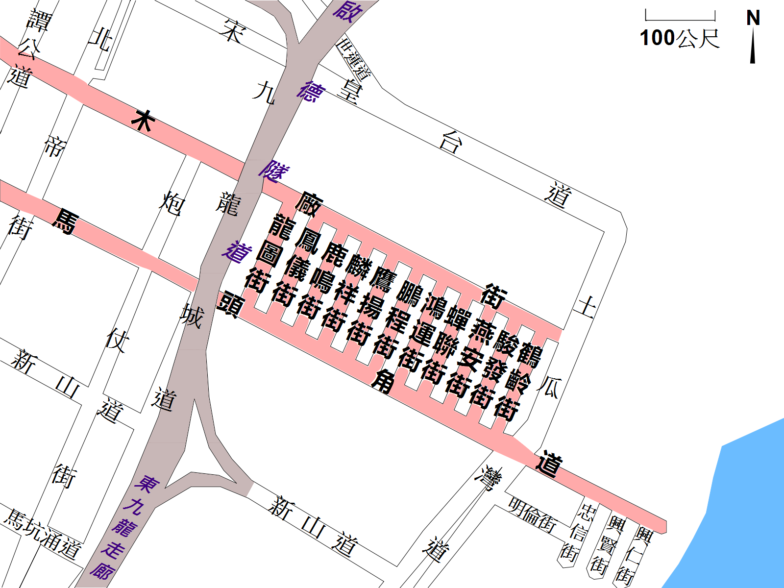 中文（香港）: 香港九龍土瓜灣十三街地圖